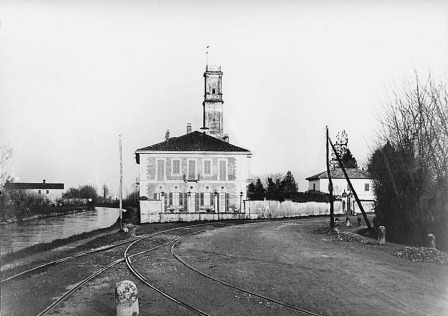 Inzago, inizio 1900